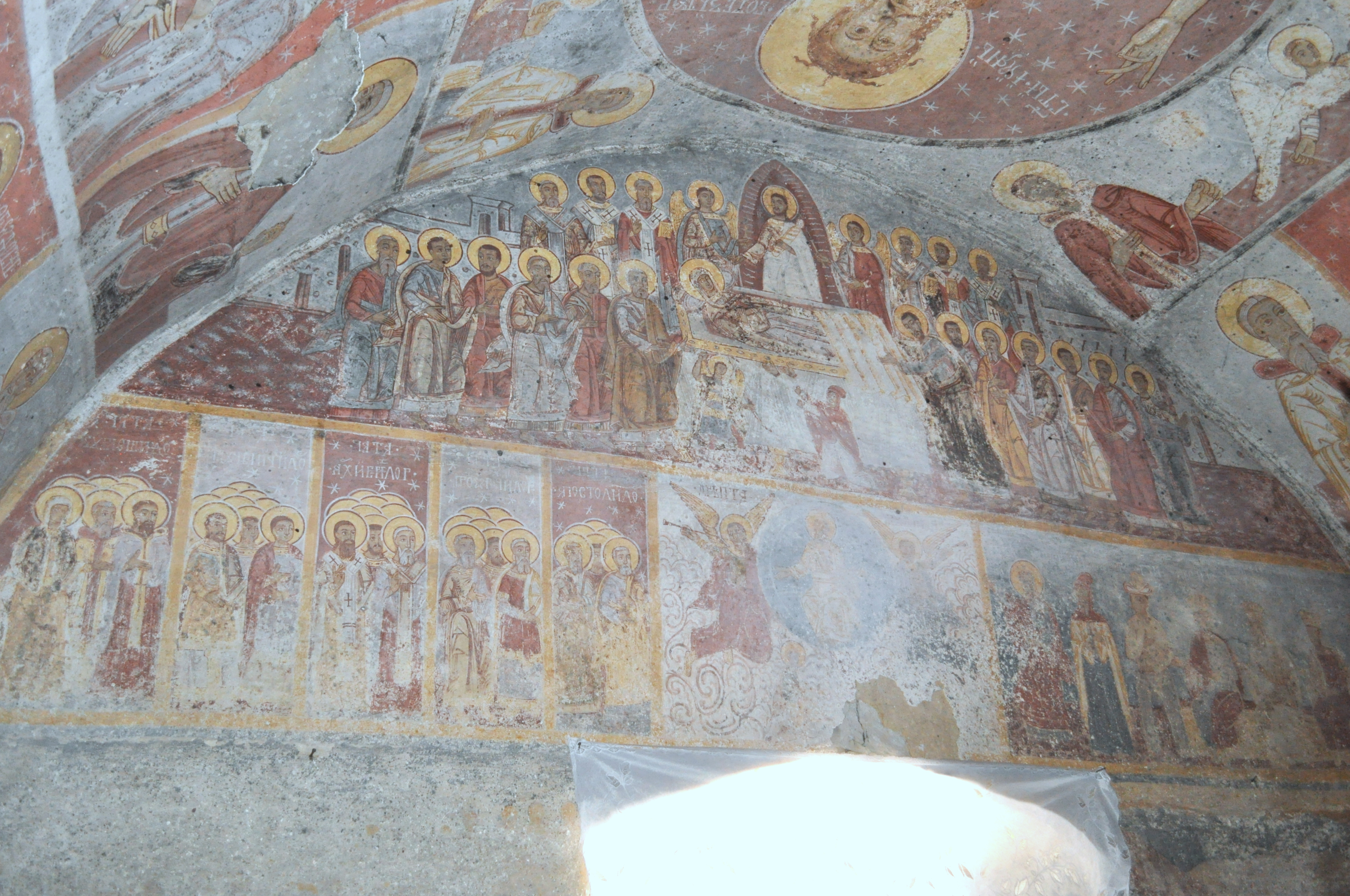 Biserica "Înălţarea Domnului" , sat NUCŞOARA; comuna SĂLAŞU DE SUS